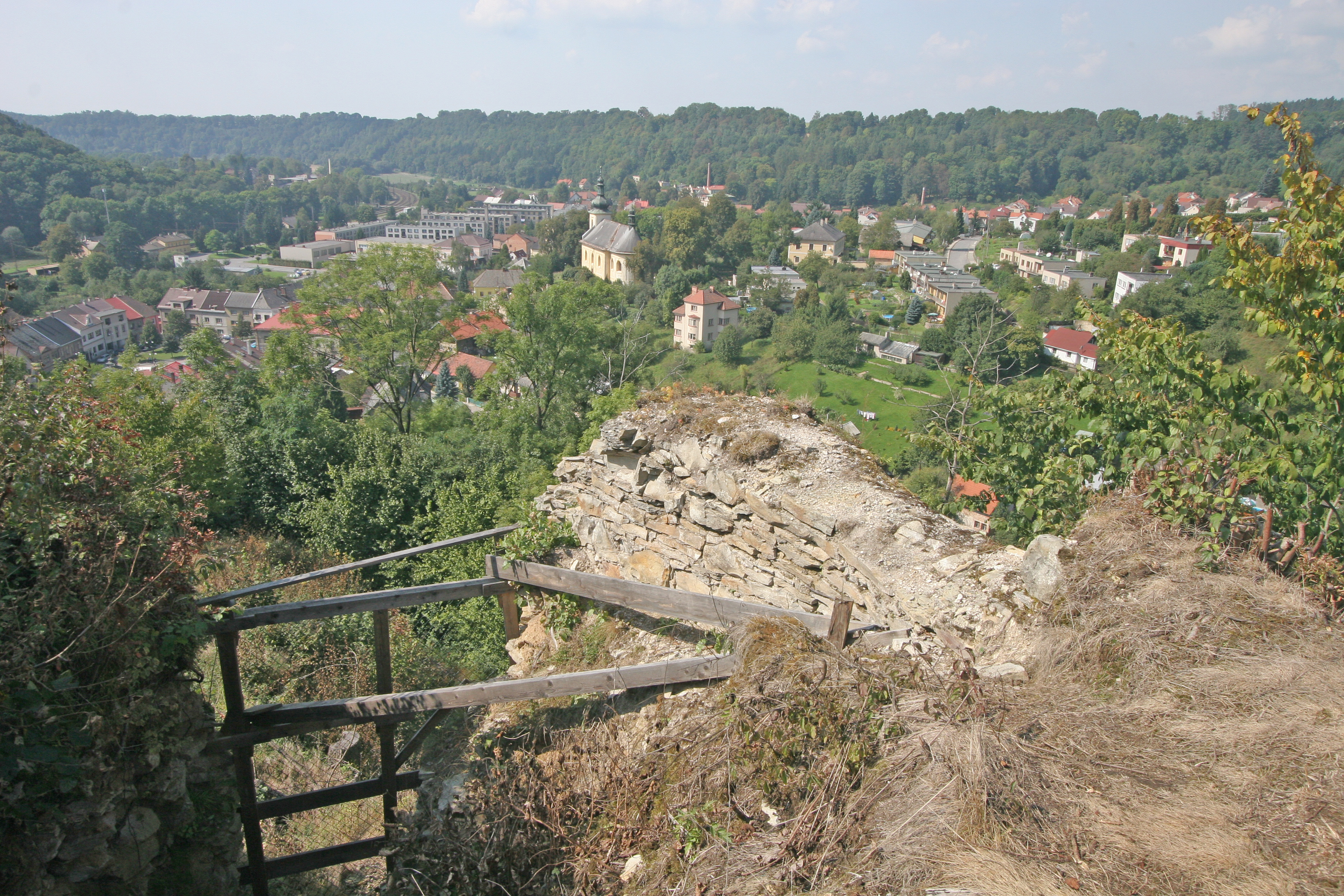 Hrad Brandýs nad Orlicí, vrch nad městem, st. 226, pp. 287/1, Brandýs nad Orlicí.